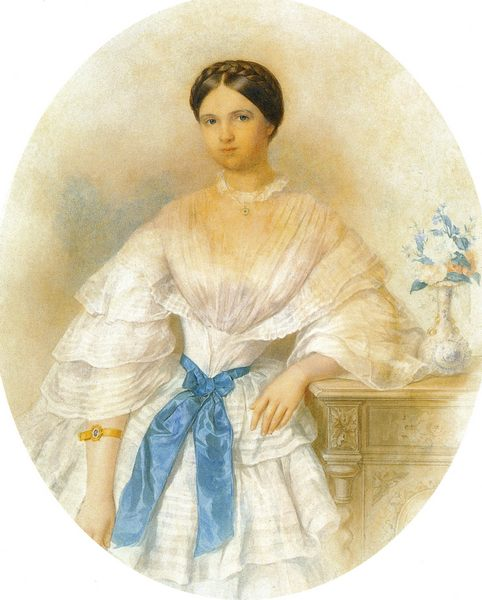 кн. Прасковья Сергеевна Щербатова (28.03.1840 - 30.06.1924), в замужестве Уварова.